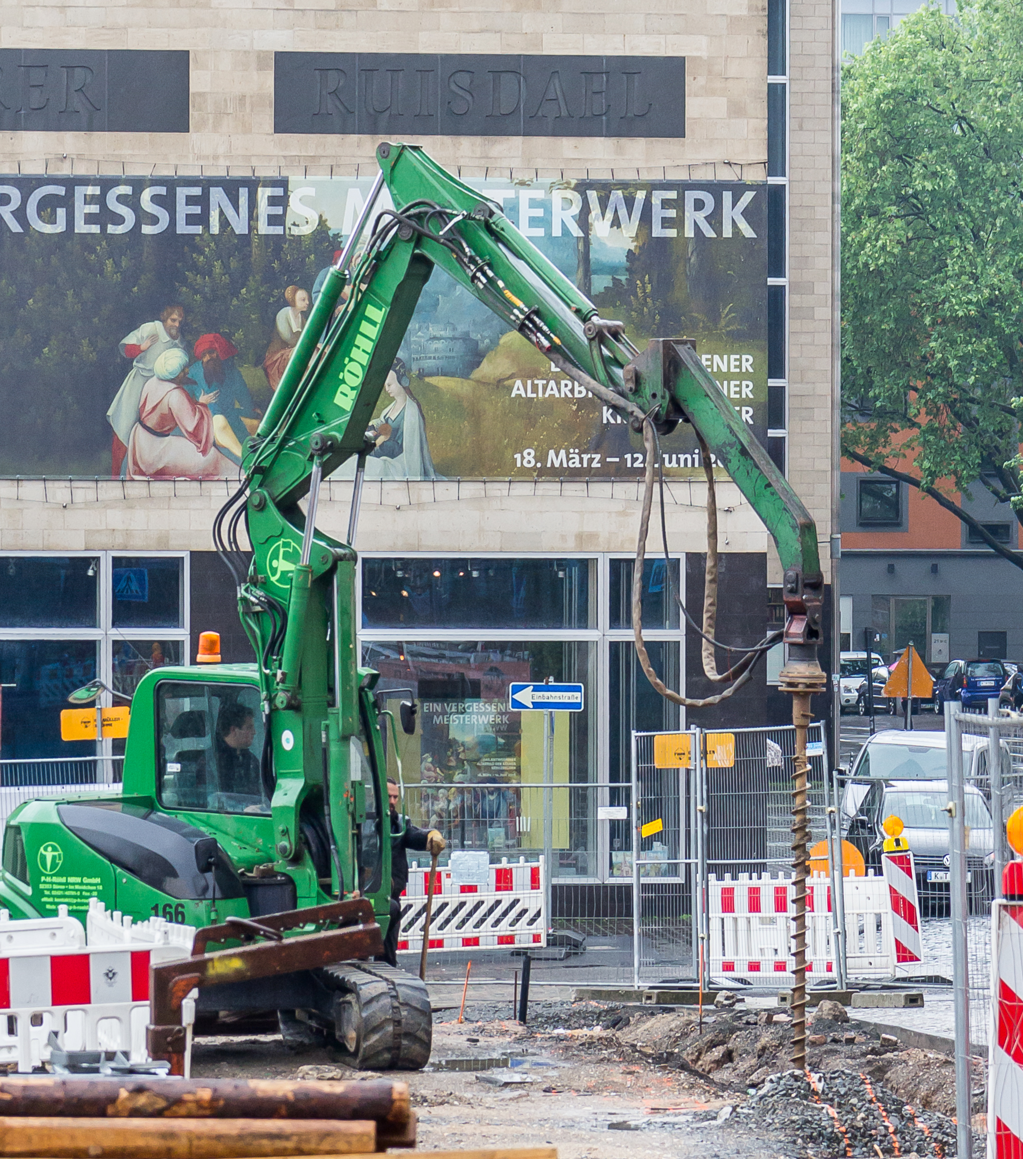 Kampfmittelräumung, Flächensondierung, Archäologische Zone Köln